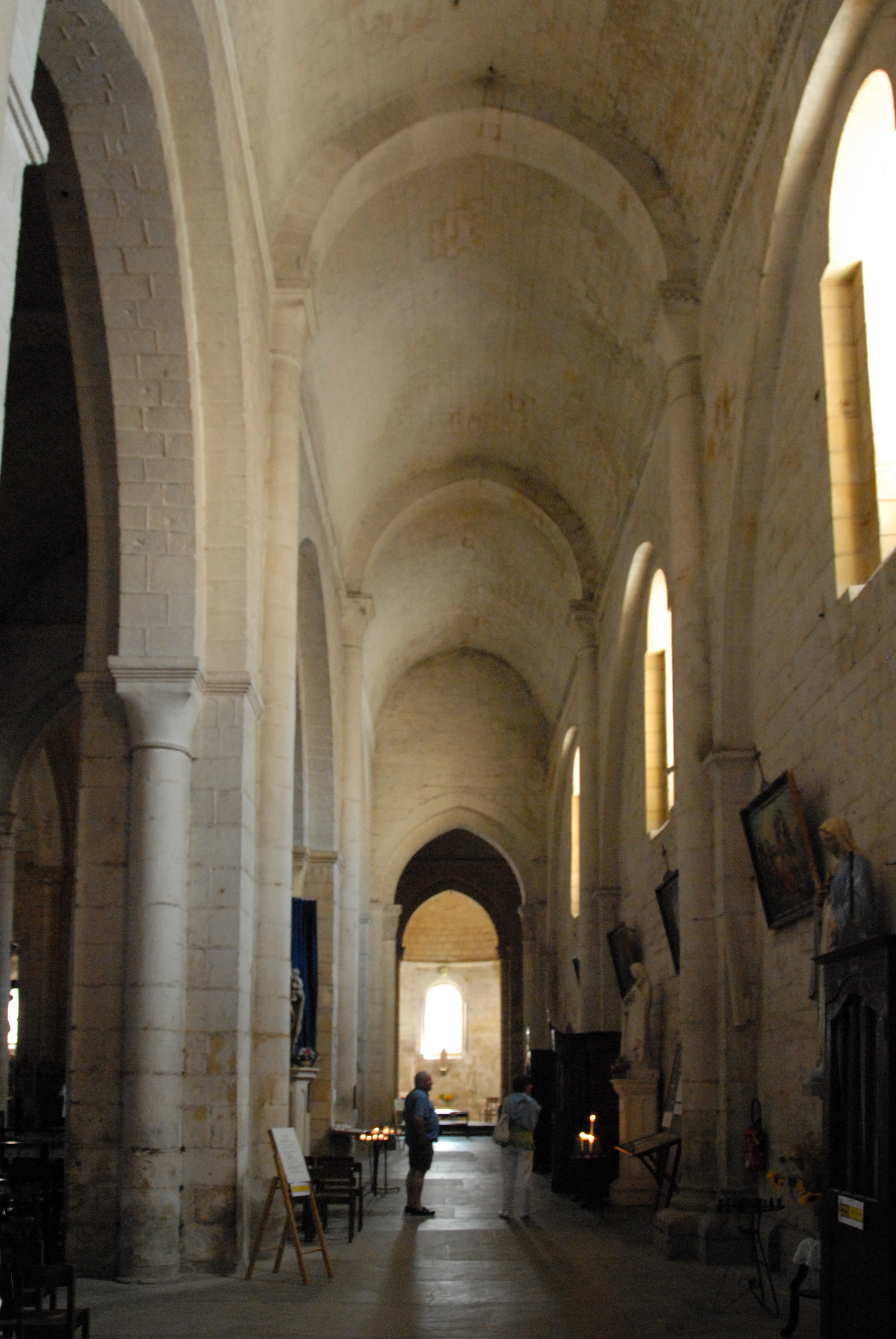 Cadouin, südl. Seitenschiff